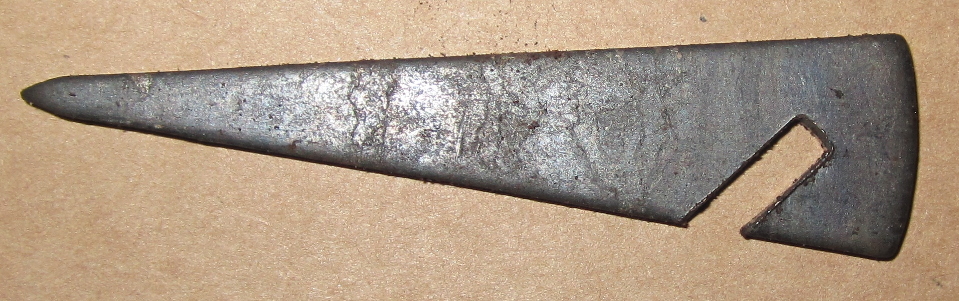 Firstnagel, Stundenöse, Locheisen, Ringeisen